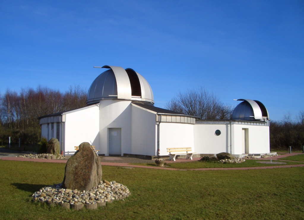 Sternwarte Peterberg, Ansicht von Süden